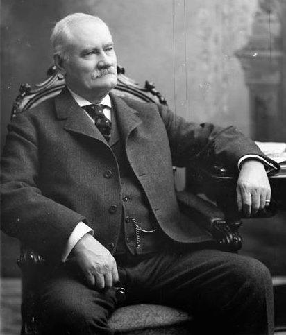 Hon. David Mackeen (Senator)